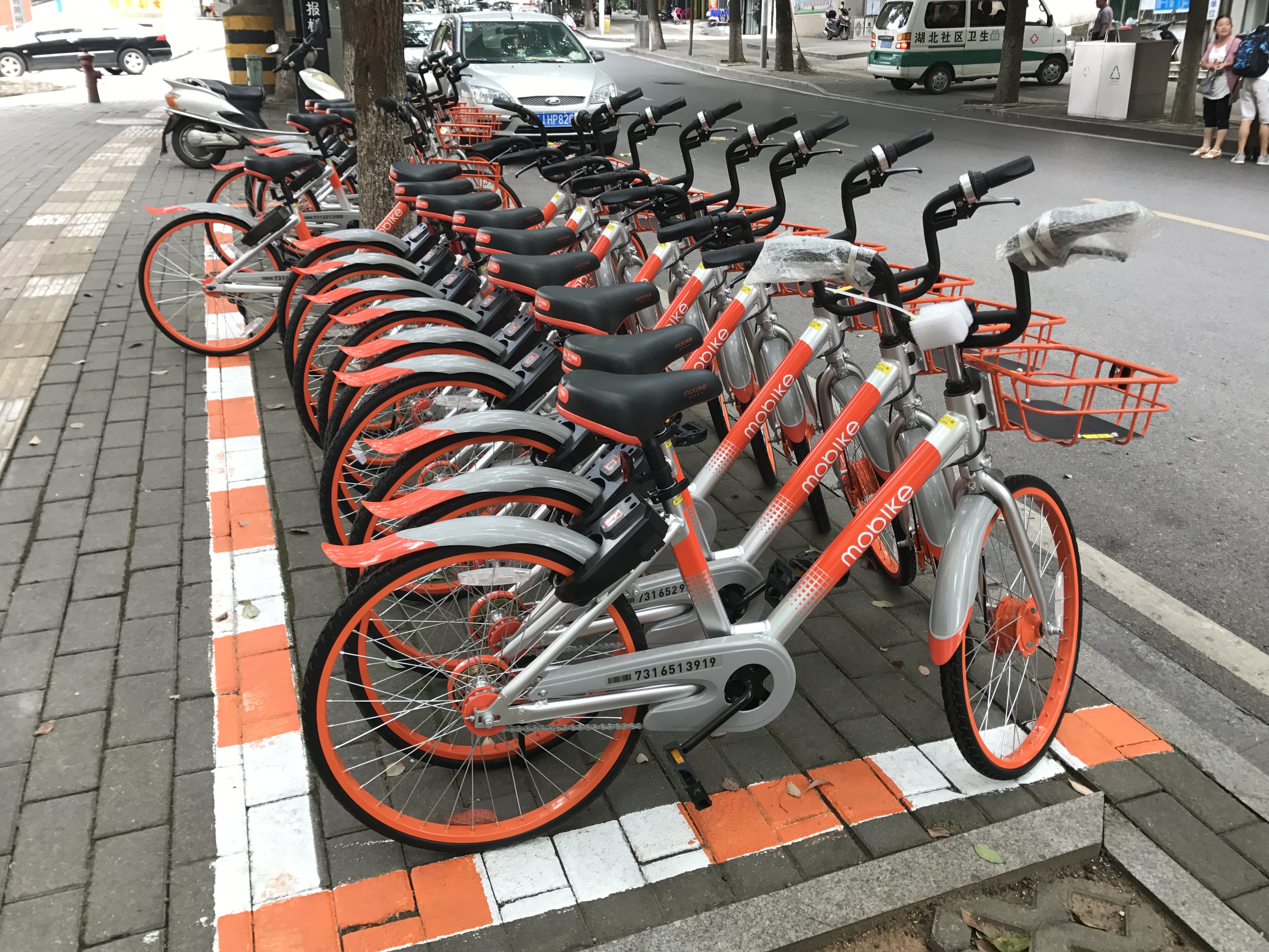 中国湖北省黄岡市黄州区のモバイク